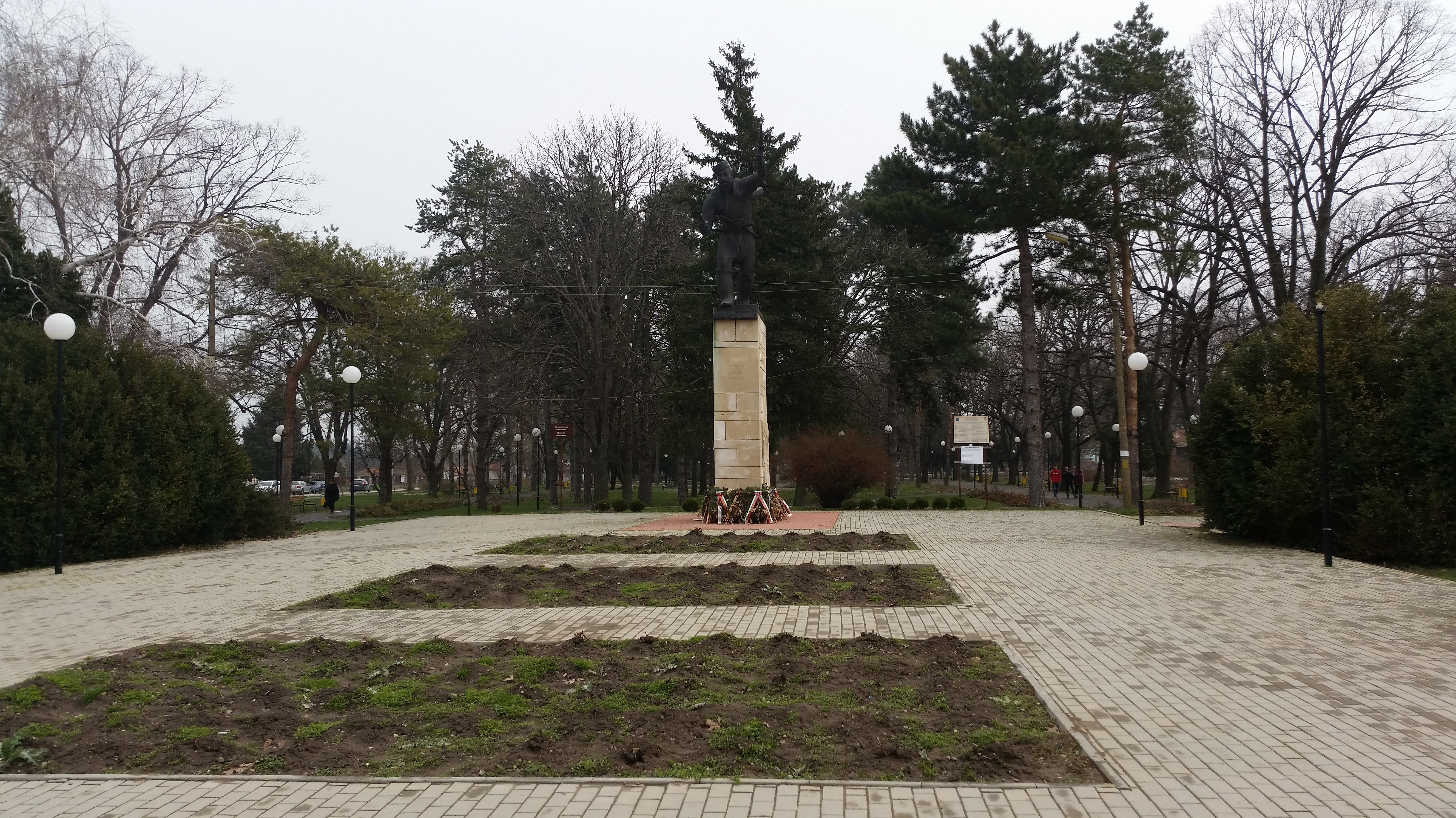 Está situado en la plaza que hay al principio del parque donde está también la estación de bus.